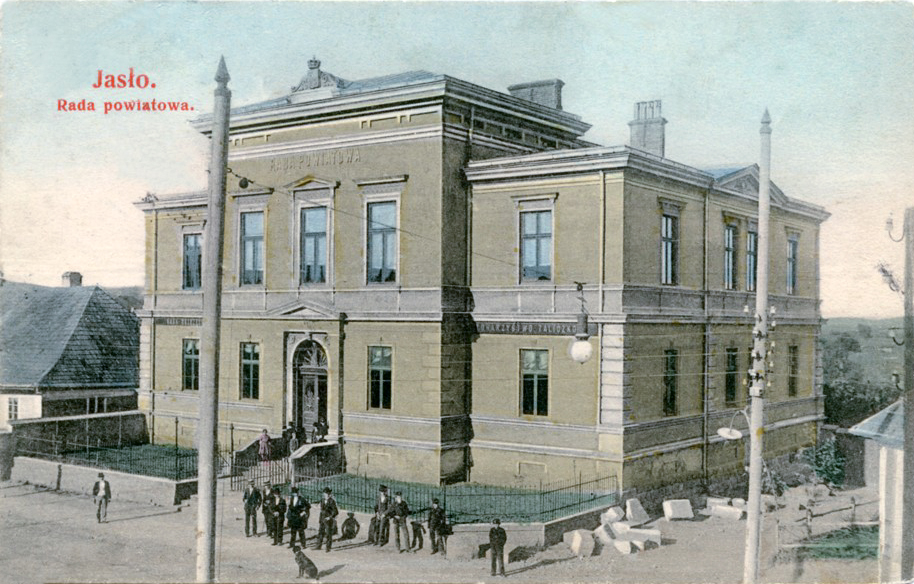 Gmach Galicyjskiej Rady Powiatowej w Jaśle, siedziba cesarza Franciszka Józefa I podczas pobytu w Jaśle w roku 1900.